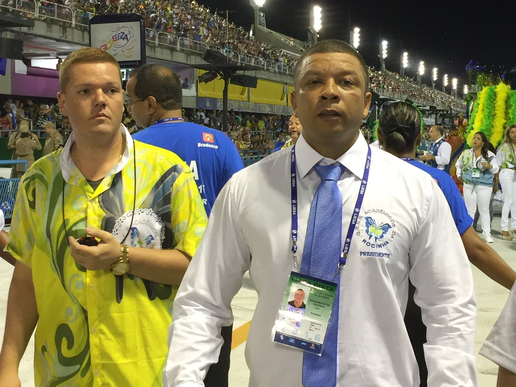 Rio de Janeiro - Presidente Ronaldo Oliveira no esquenta da escola incentivou os componentes da escola Acadêmicos da Rocinha (Cristina Índio do Brasil/Agência Brasil)